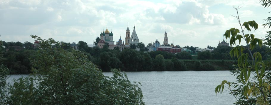 Вид на Старую Коломну из-за Москвы-реки